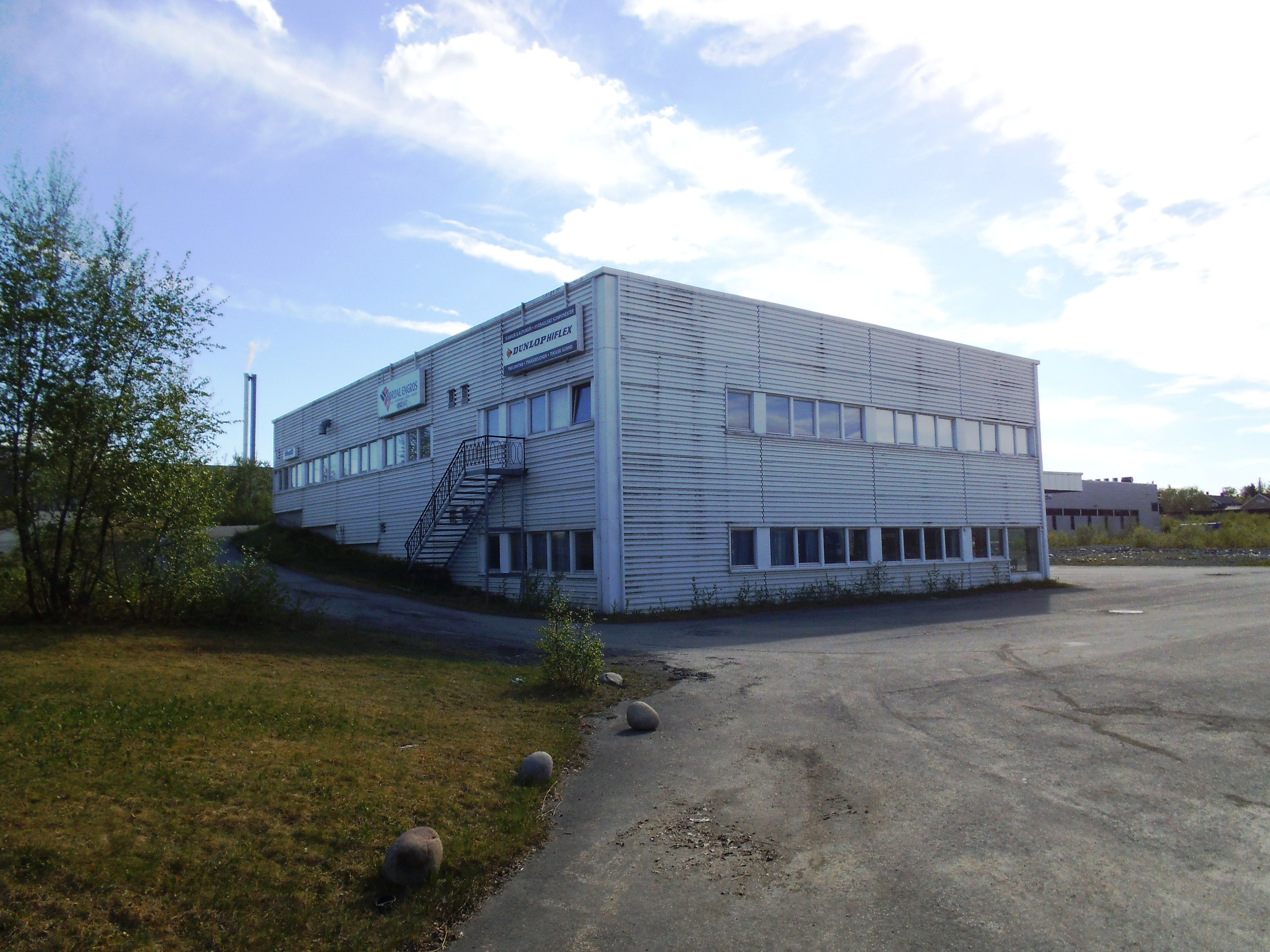 En lagerbygning på Østre Rosten, Tiller i Trondheim